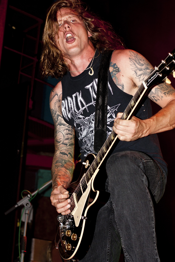 Peter Adams, guitarrista de Baroness, actuando en Bilbao.